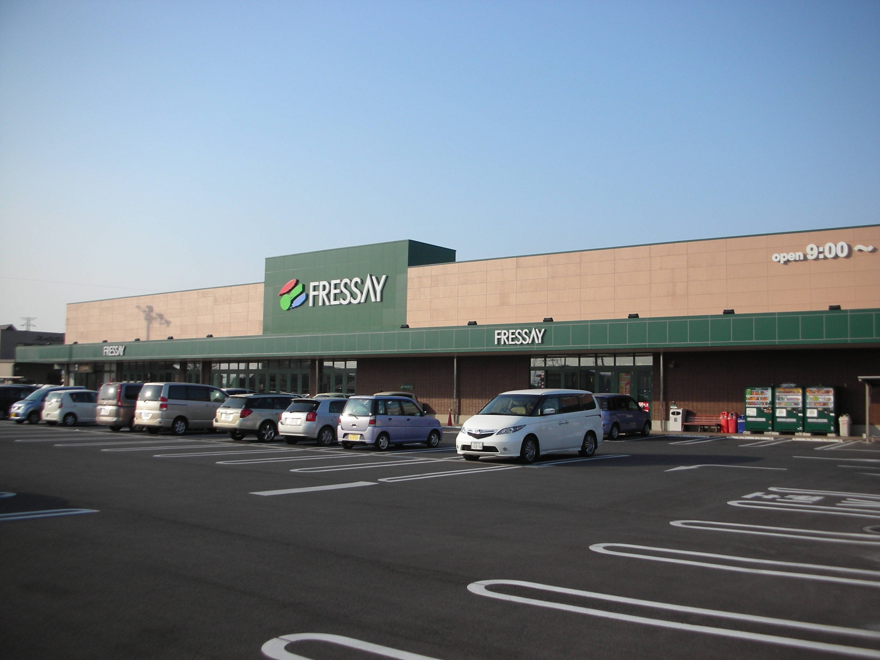 フレッセイ連取店の外観